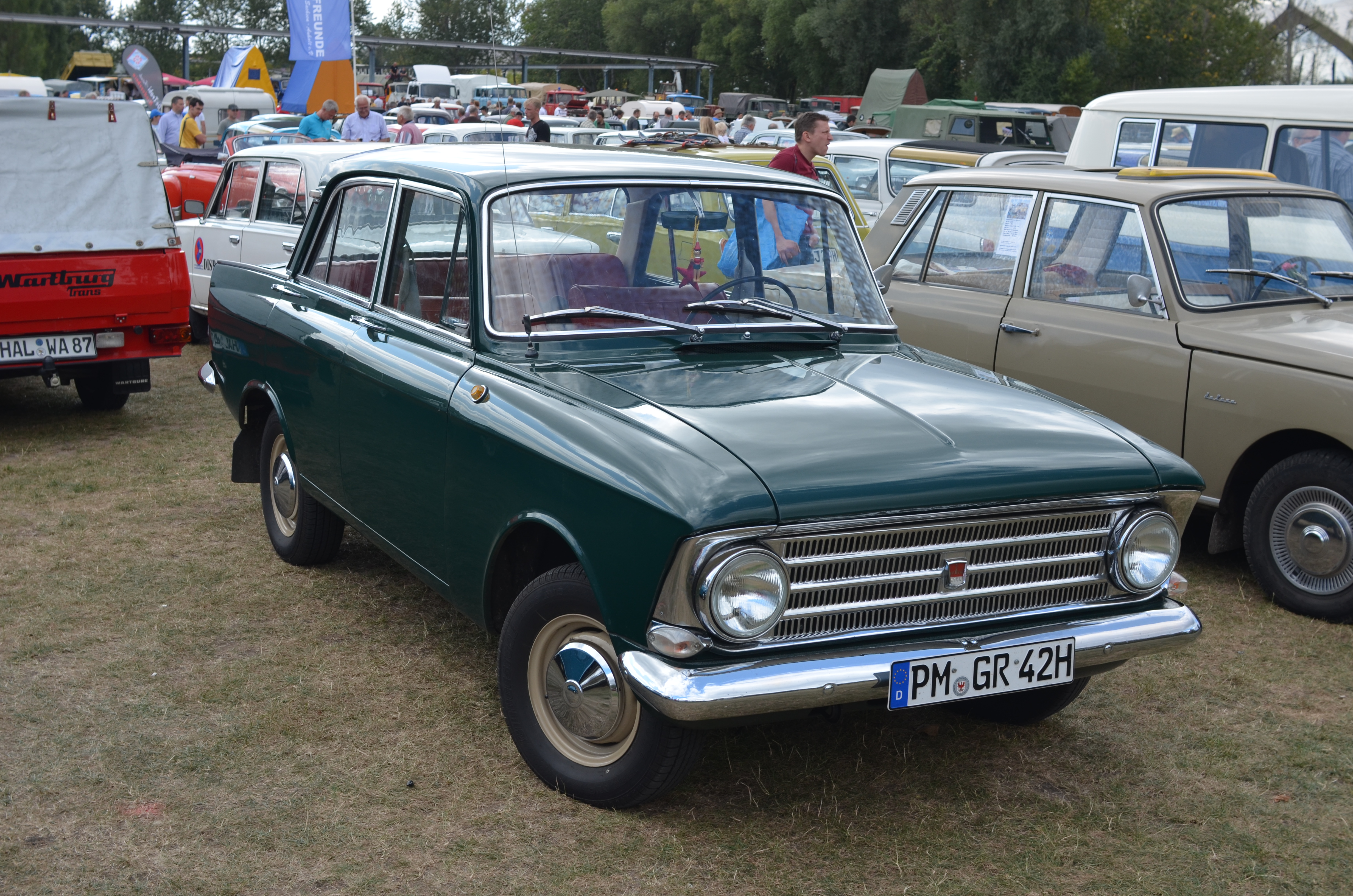 Moskwitch